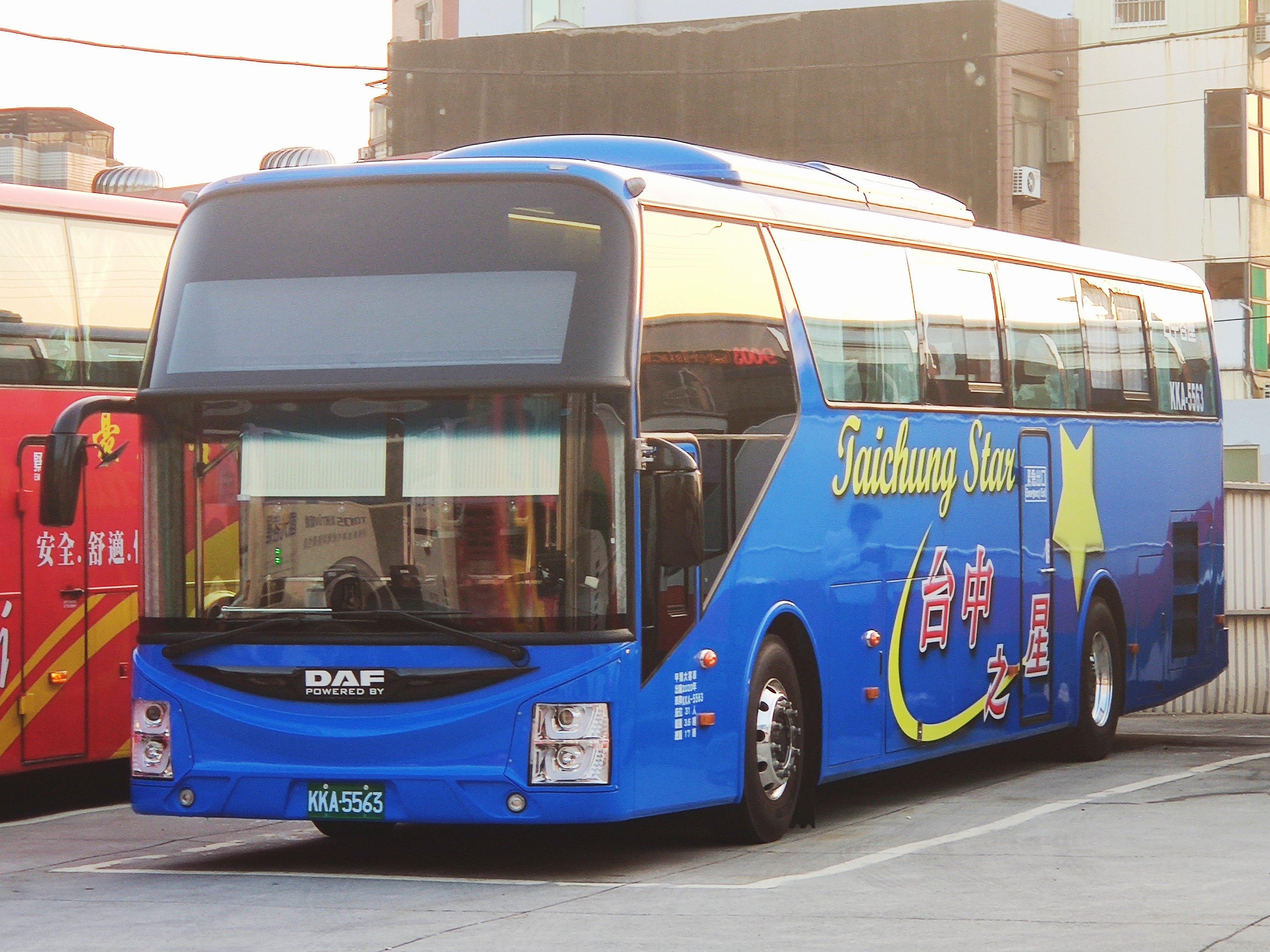 台中客運 廈門金龍JMH-KL DF400-6100大客車 KKA-5563